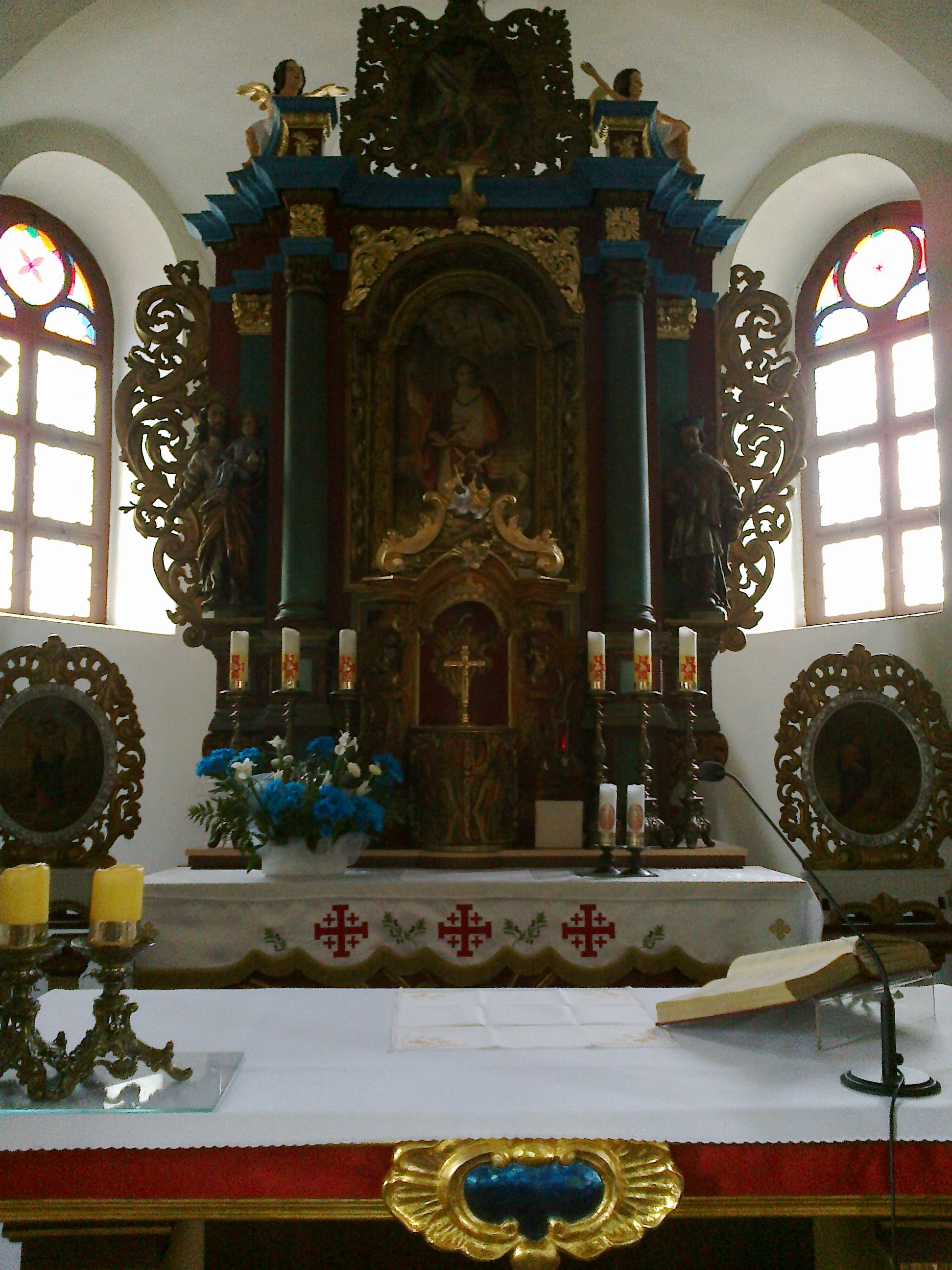 Bzowo - widok ołtarza przed renowacją, umieszony jest w środku prezbiterium kościoła.